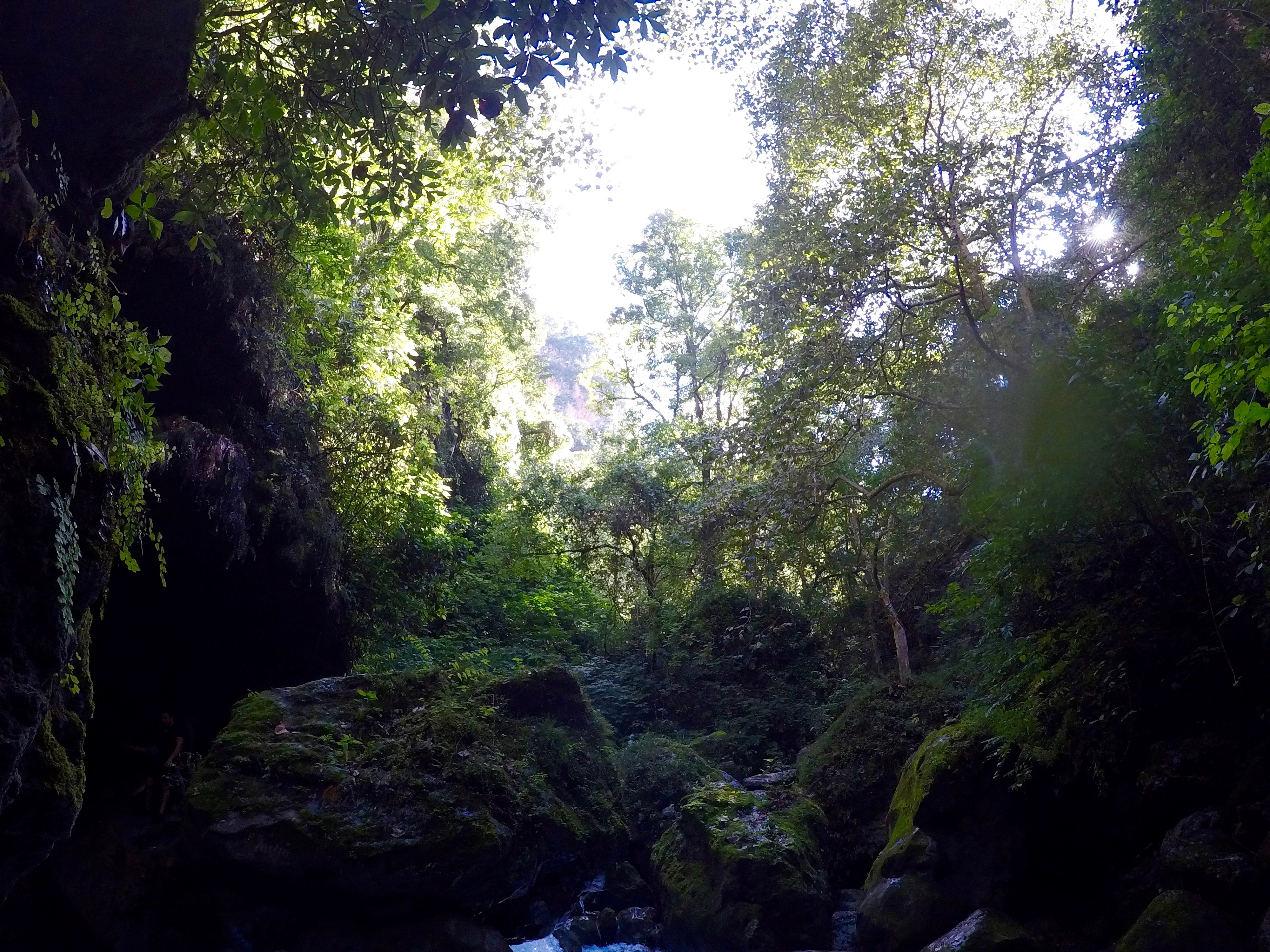 Vista de la flora que rodea el río escanela en el municipio de JAlpan de Serra en Querétaro